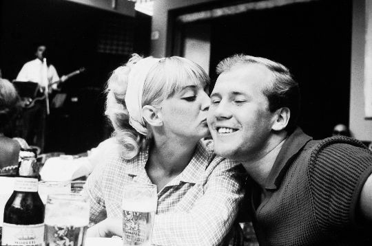 Teija Sopanen ja Pertti Purhonen Helsingin Riccionessa.